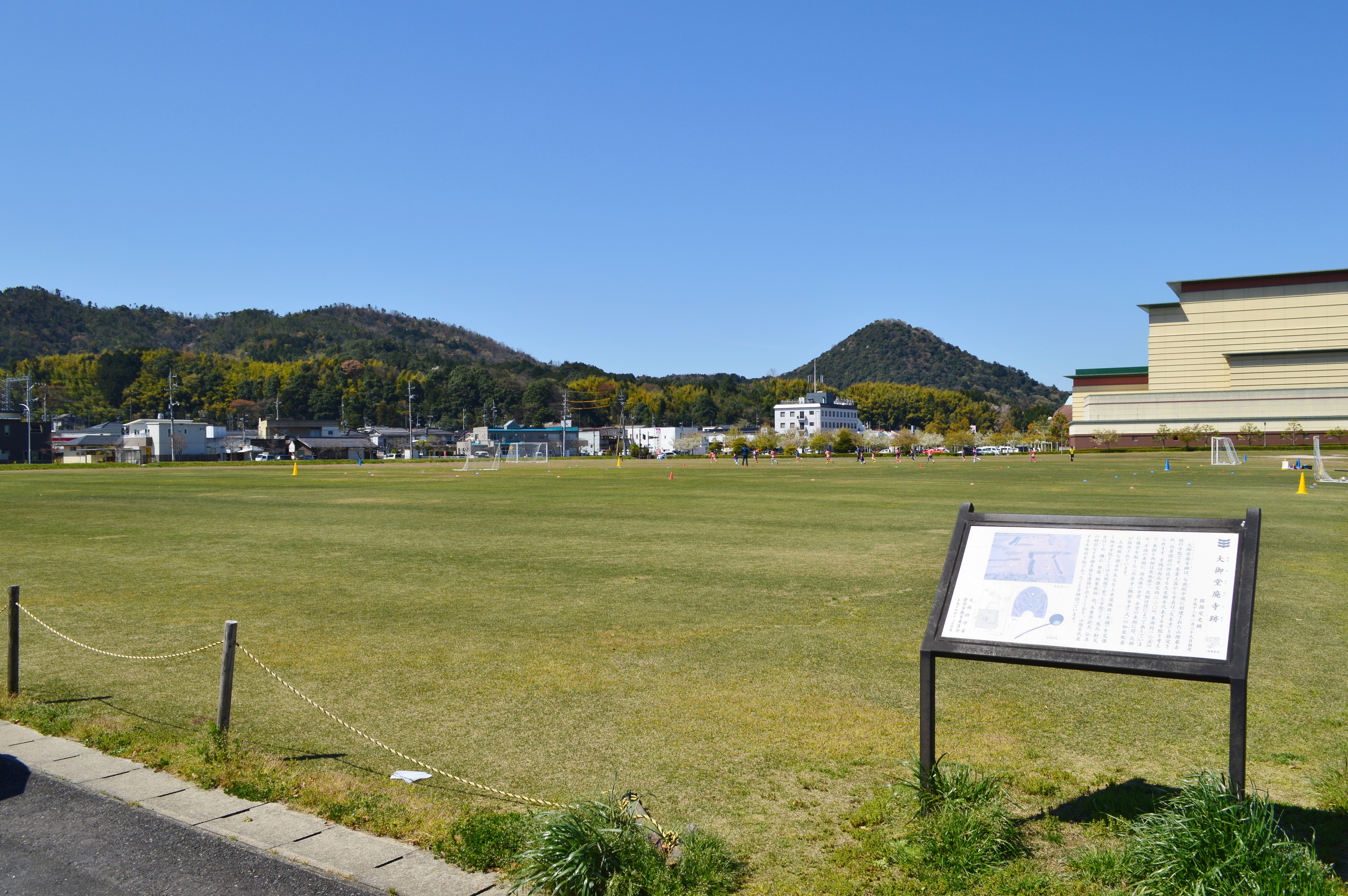 大御堂廃寺跡 伽藍遠景 Nikon D3200